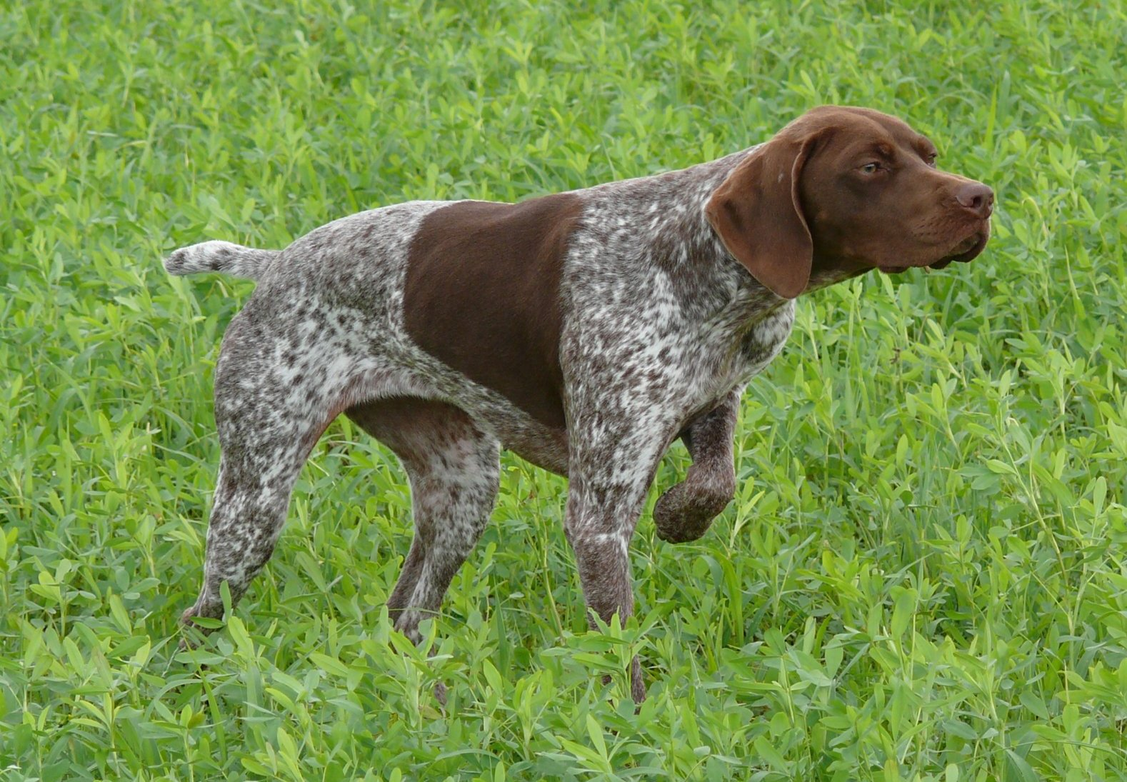 Braque Francais